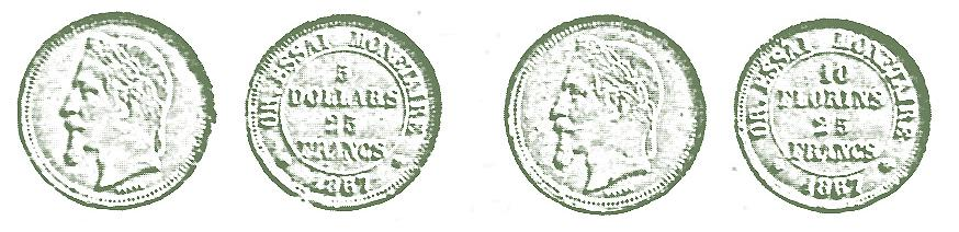 Dessins des essais monétaires internationaux de 1867